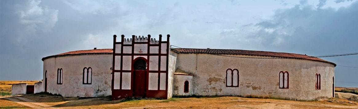 Plaza de Toros de Ledesma . Santiago de Madrigal. 1914-1916 # REDIRECT